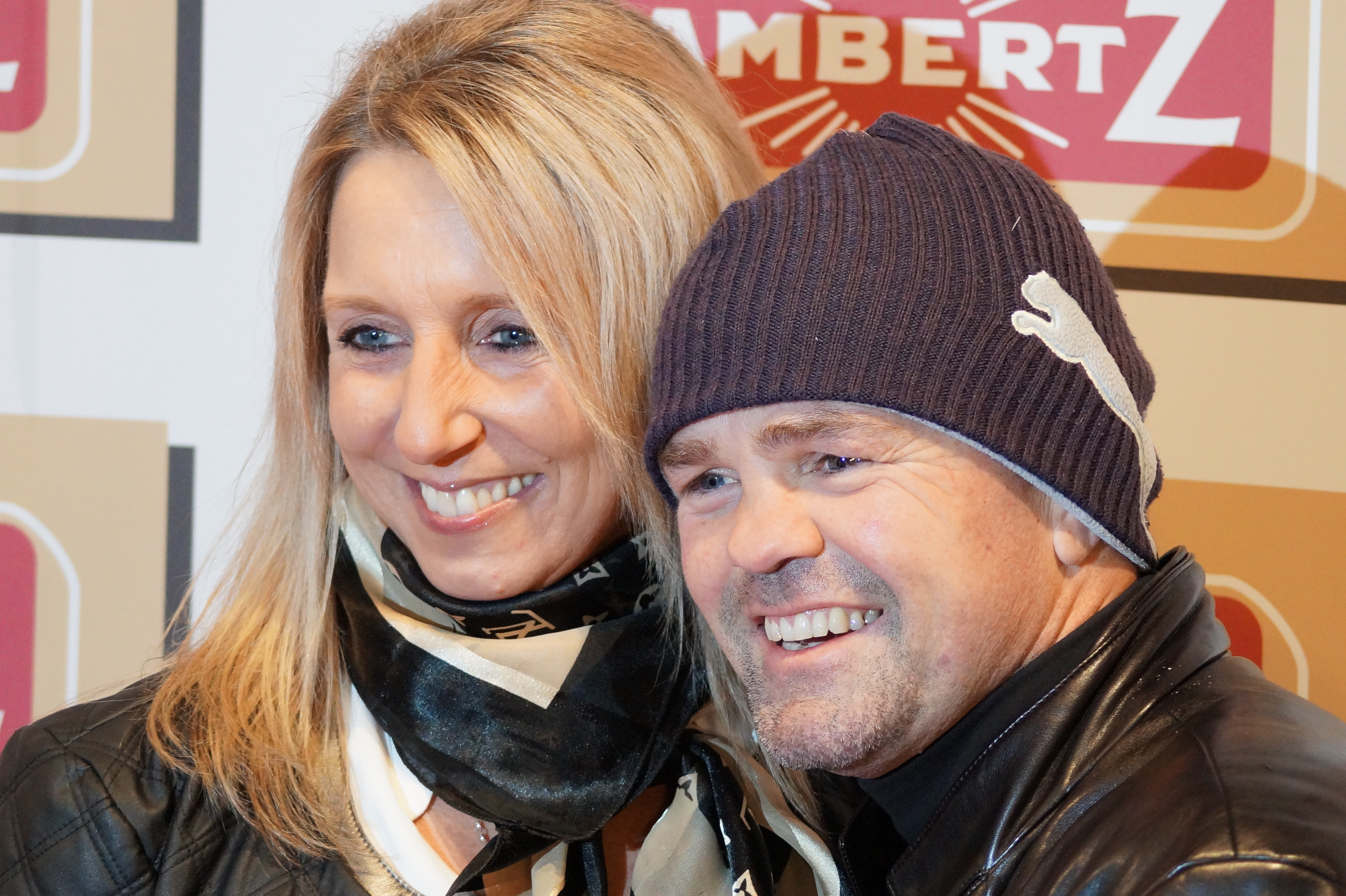 "Lambertz Monday Night 2015" im "Alten Wartesaal" in Köln, am 02.02.2015.